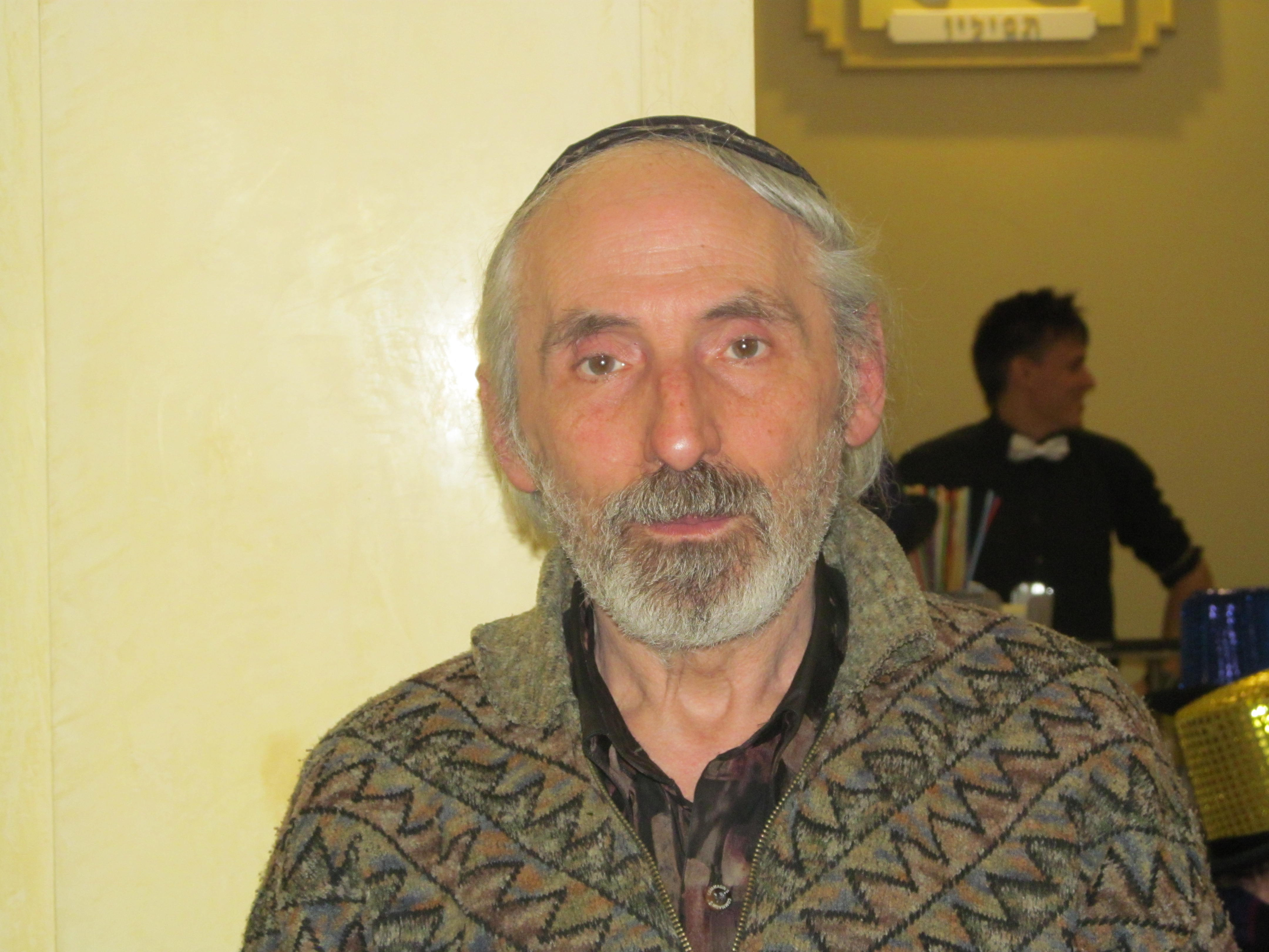 Поэт Илья Риссенберг